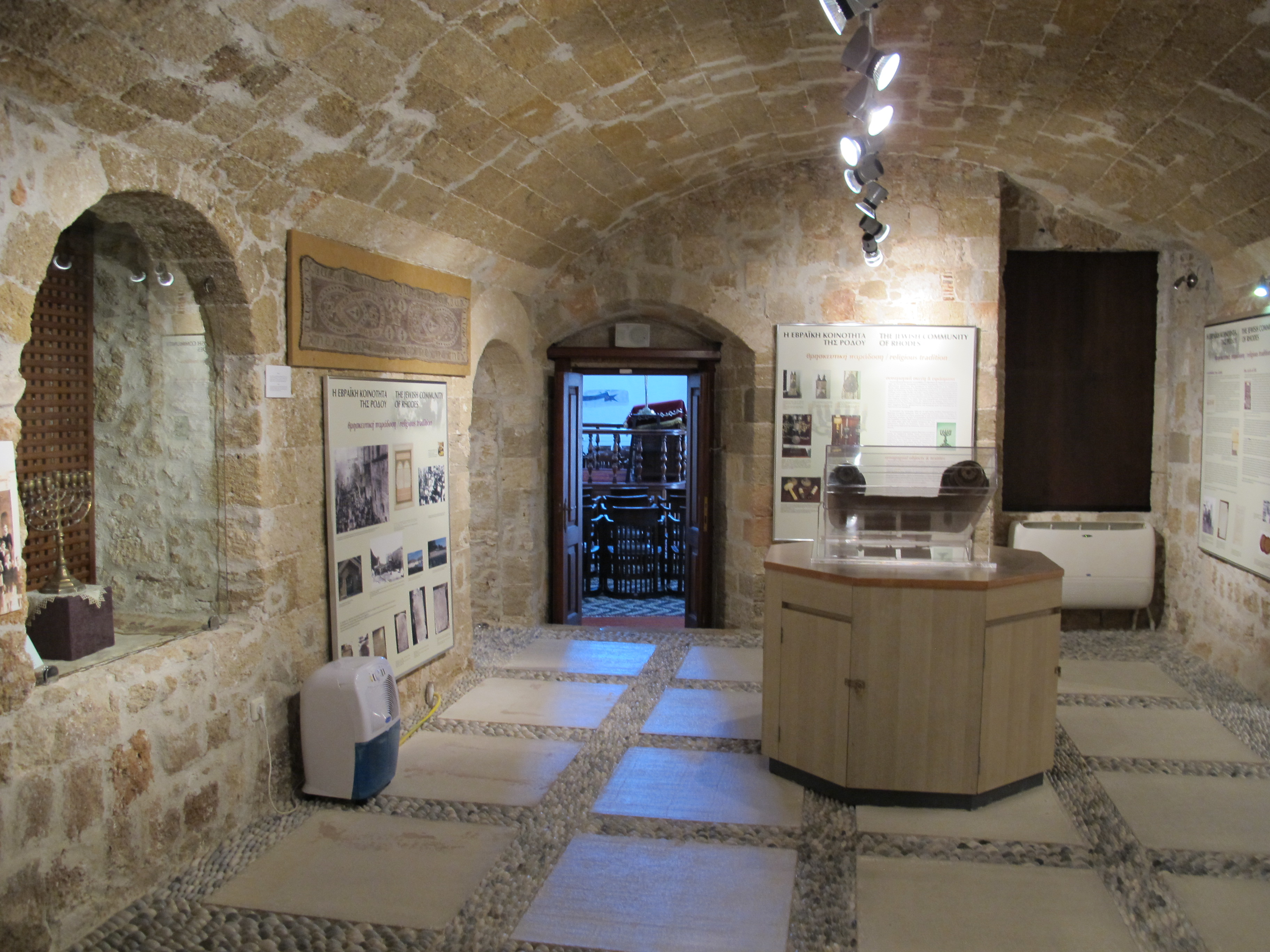 Rosi, Kahal Shalom Synagogue, museo, sala